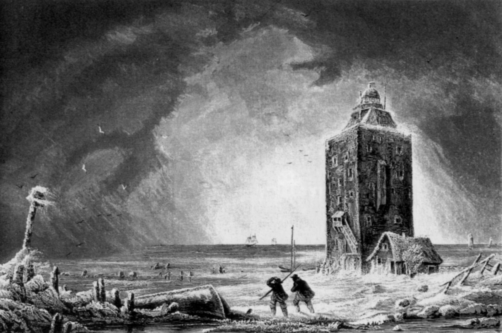 Cuxhaven, Insel Neuwerk an der Elbmündung mit aufziehendem Regen. Stahlstich (um 1840) von Henry Winkles (nach einer Zeichnung von Johann Heinrich Sander). Ca. 10 × 15 cm. Illustration aus Georg Wigand: Das malerische und romantische Deutschland, 10 Bände, Leipzig 1836-41